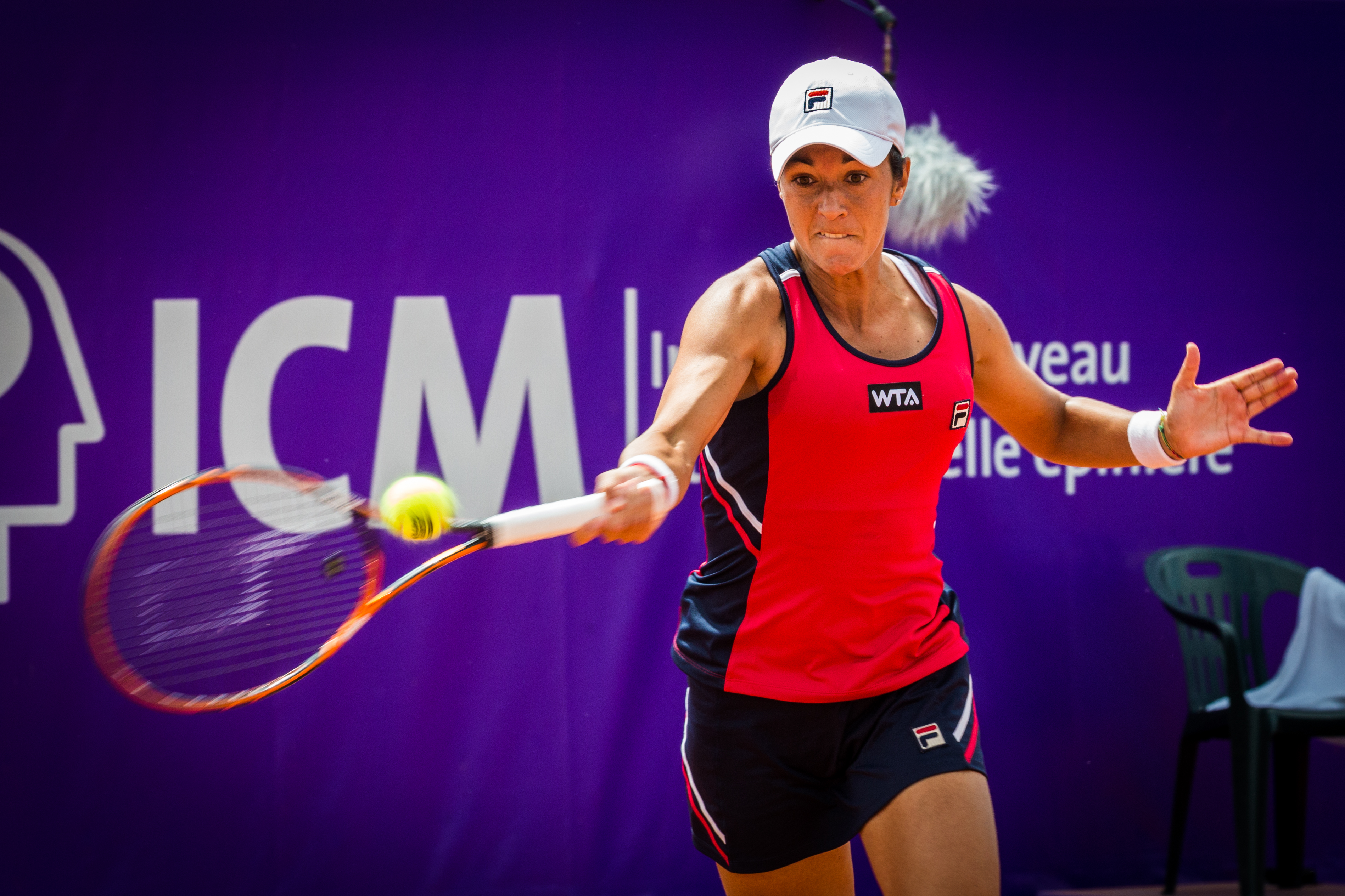 Sílvia Soler Espinosa, née le 19 novembre 1987 est une joueuse de tennis espagnole.